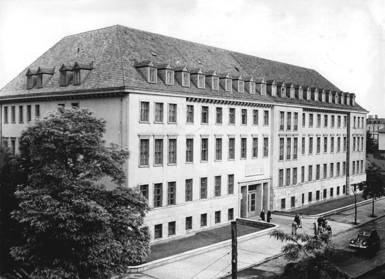 Zentralbild-Biscan Wjt-Ho. 11.7.1956 Magdeburg besitzt die modernste Frauenklinik der DDR Die neue Technik im Dienst der Babys - Getrocknete Frauenmilch In der Landesfrauenklinik in Magdeburg stehen Errungenschaften der modernen ärztlichen Wissenschaft bereit, die kleinen Erdenbürger zu empfangen und alle Gefahren der ersten Lebenstage abzuwenden. Unter der Leitung von Prof. Dr. Josef Peter Emmrich ist auf den Ruinen des kriegszerstörten Hauses eine neue vorbildliche Klinik entstanden, die zu den modernsten und besteingerichteten ganz Deutschlands zählt. Im Durchschnitt kommen hier 170 Kinder im Monat zur Welt. Die perinatale Sterblichkeit konnte seit Kriegsende auf einen Bruchteil gesenkt werden. Als neueste Errungenschaft wird in der Klinik eine neuentwickelte Anlage zur Herstellung von Trocken-Frauenmilch in Betrieb genommen. Dadurch wird es der Frauenmilchsammelstelle der Klinik möglich, Vorräte dieser wichtigsten und unentbehrlichen Säuglingsnahrung anzulegen und in Zeiten grösseren Milchbedarfs einzusetzen, um das Leben Neugeborener zu erhalten. Mit der Trocken-Frauenmilch können auch Säuglinge in entlegenen Landgemeinden versorgt werden, die auf künstliche Ernährung angewiesen sind. UBz, Der Neubau der Landesfrauenklinik in Magdeburg, der unter der Leitung von Prof. Dr. Emmrich auf den Resten der durch amerikanische Bomben zerstörten alten Klinik errichtet worden ist.